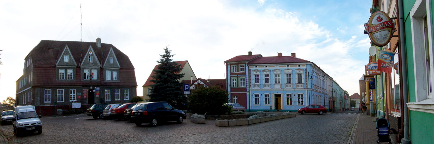 Rynek w Maszewie